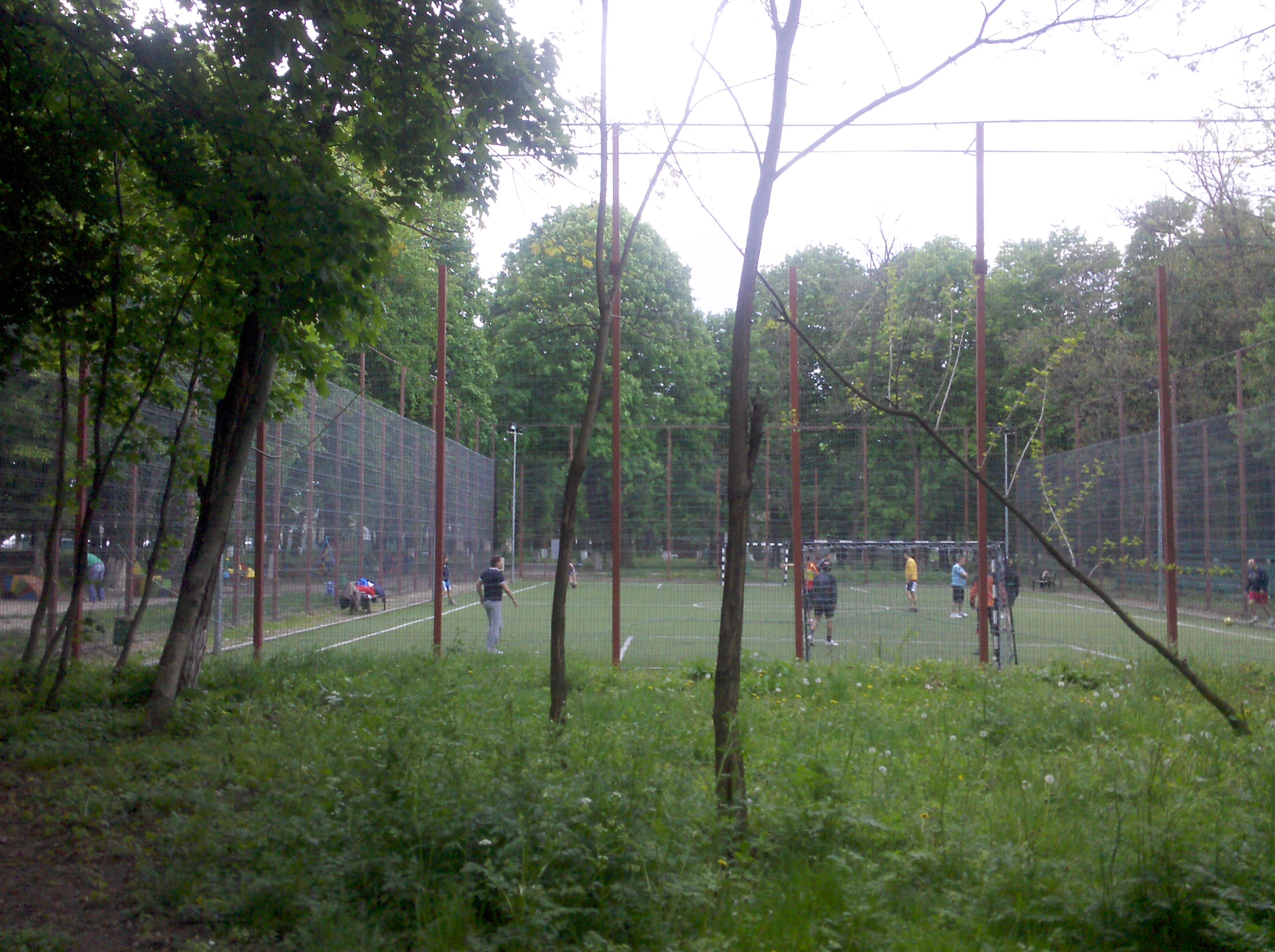 tereno del futbol del parque de Roman